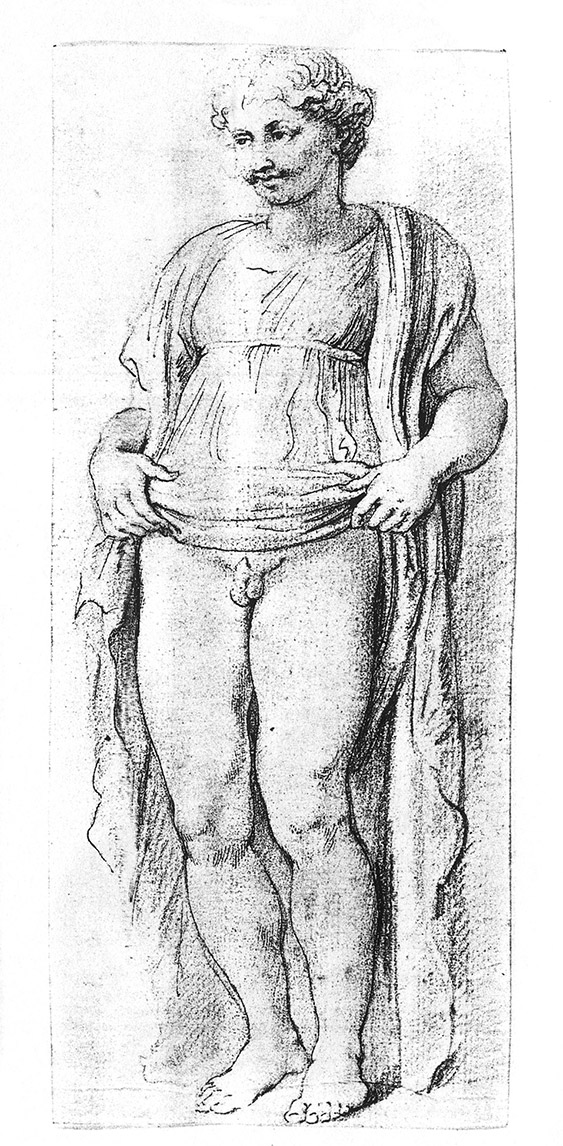 Autore Anonimo, Ermafrodito pubblicato in Marjon van der Meulen, Rubens Copies after the Antique, London, 1995, III, fig. 123 . Si tratta della copia di un disegno perduto di Rubens.